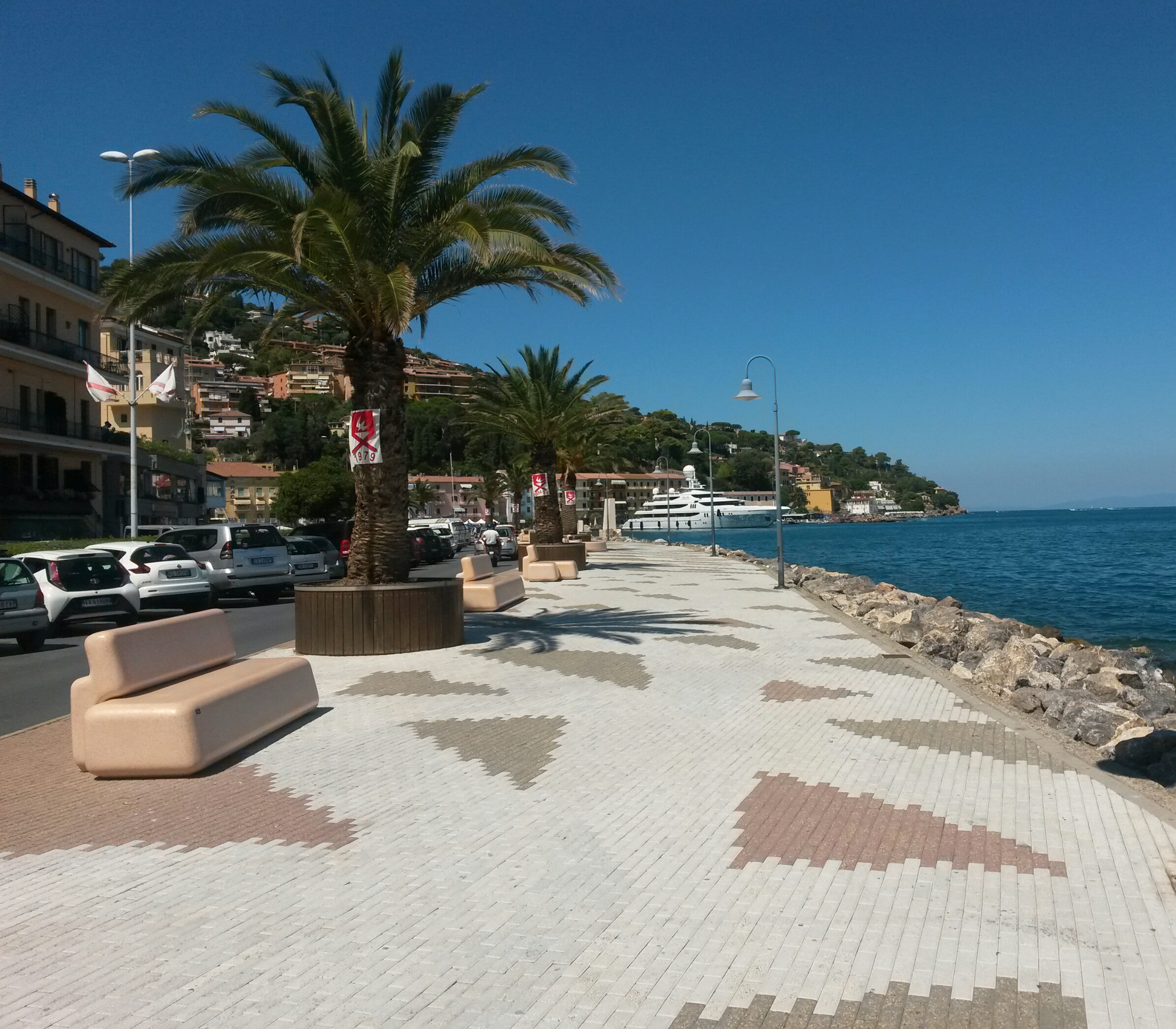 Lungomare dei Navigatori di Giorgetto Giugiaro